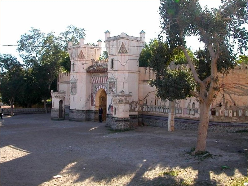 Minas de Uixan y Setolazar (14)